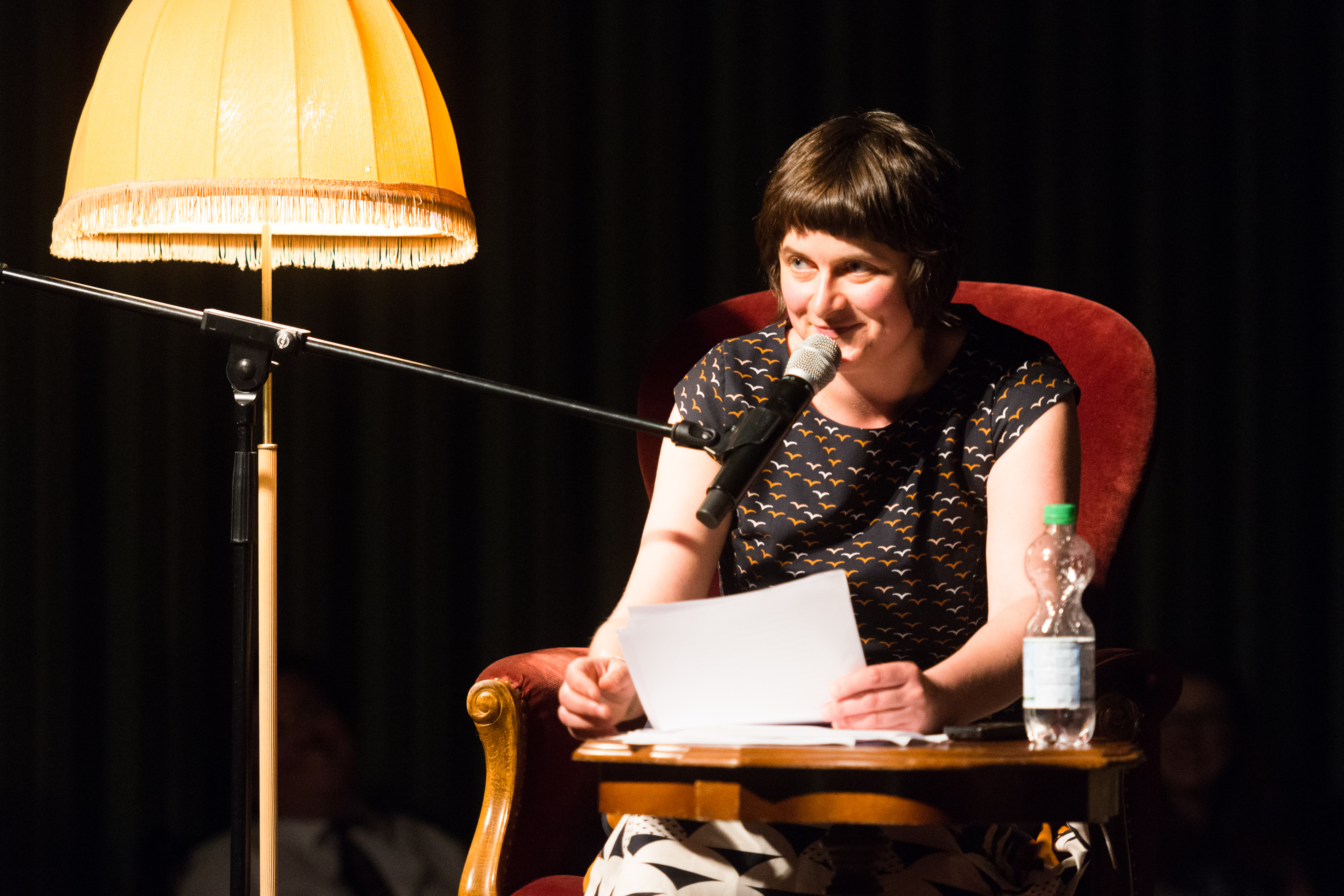 Ella Carina Werner (* 1979 in Hamburg) ist eine deutsche Autorin, Satirikerin und Redakteurin des Satiremagazins "Titanic".